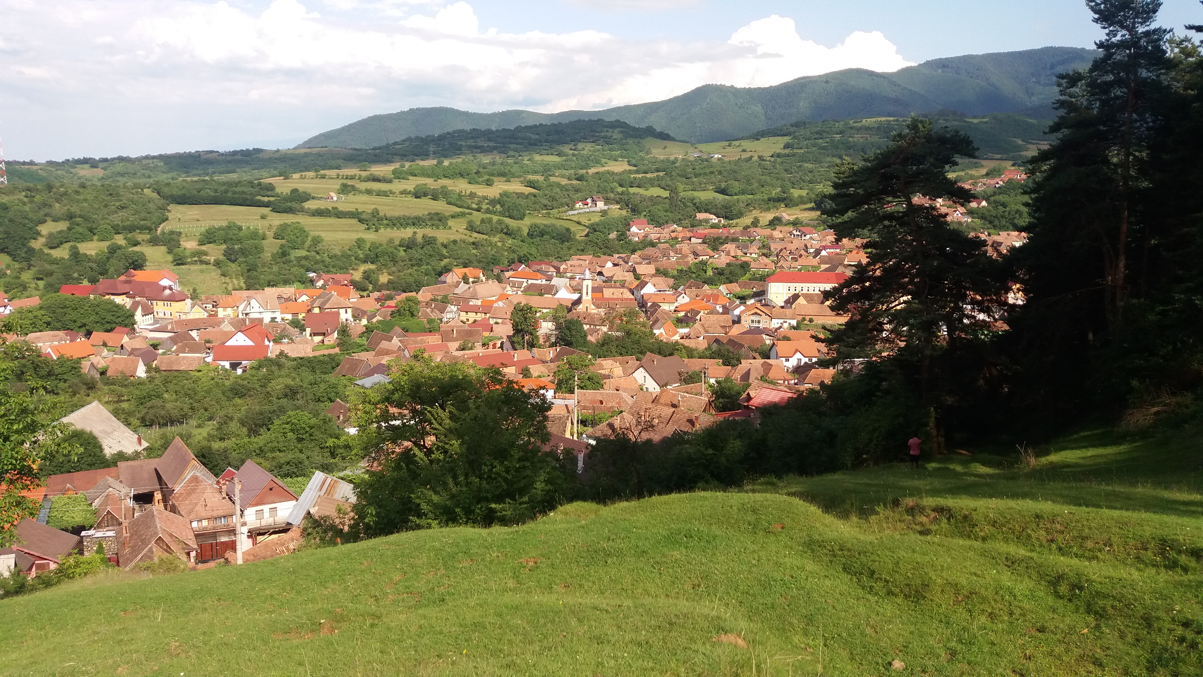 Rășinari